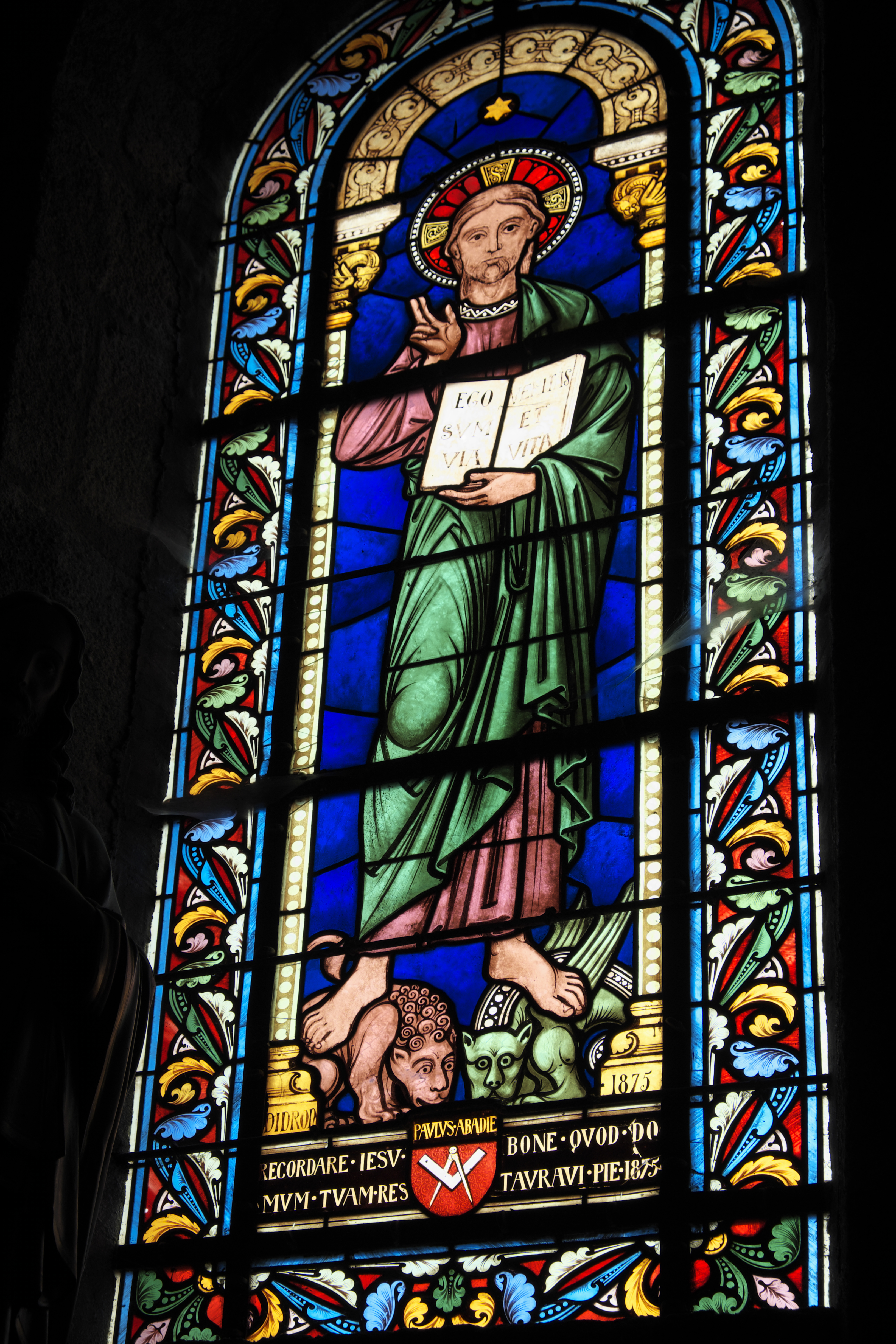 Kirche Saint-Barthélémy in Bénévent-l’Abbaye im Département Creuse (Nouvelle-Aquitaine/Frankreich), Bleiglasfenster mit der Signatur: DIDRON 1875; Darstellung: Ich bin der Weg und die Wahrheit und das Leben